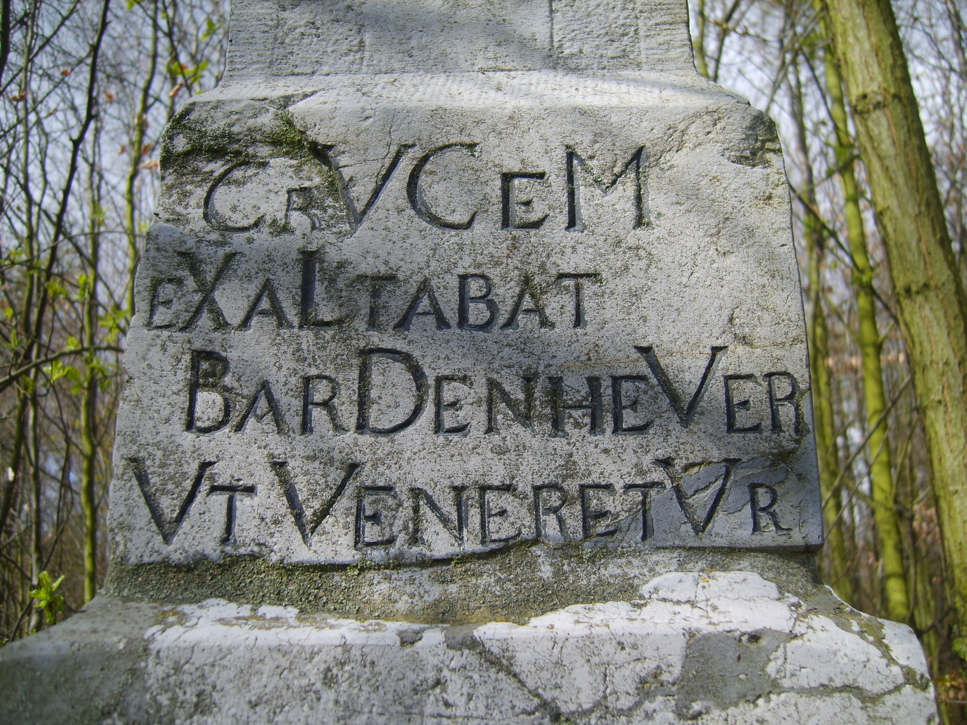 Erbericher Kreuz am Blausteinsee beim Eschweiler Stadtteil Neu-Lohn mit Chronogramm